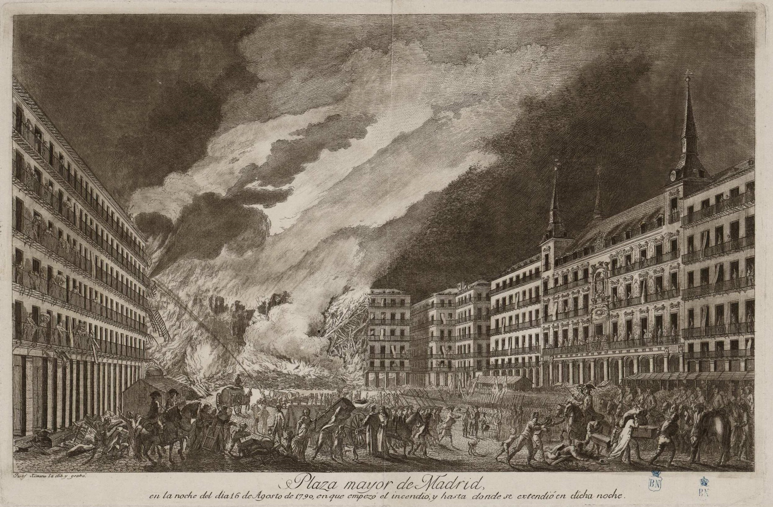 Incendio de la Plaza Mayor de Madrid la noche del 16 de agosto de 1790, grabado al aguafuerte y aguatinta de José Jimeno por dibujo propio. Biblioteca Nacional de España